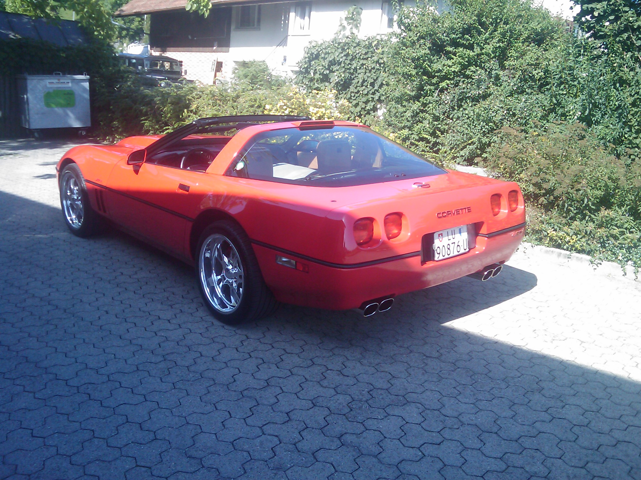 Corvette ZR-1